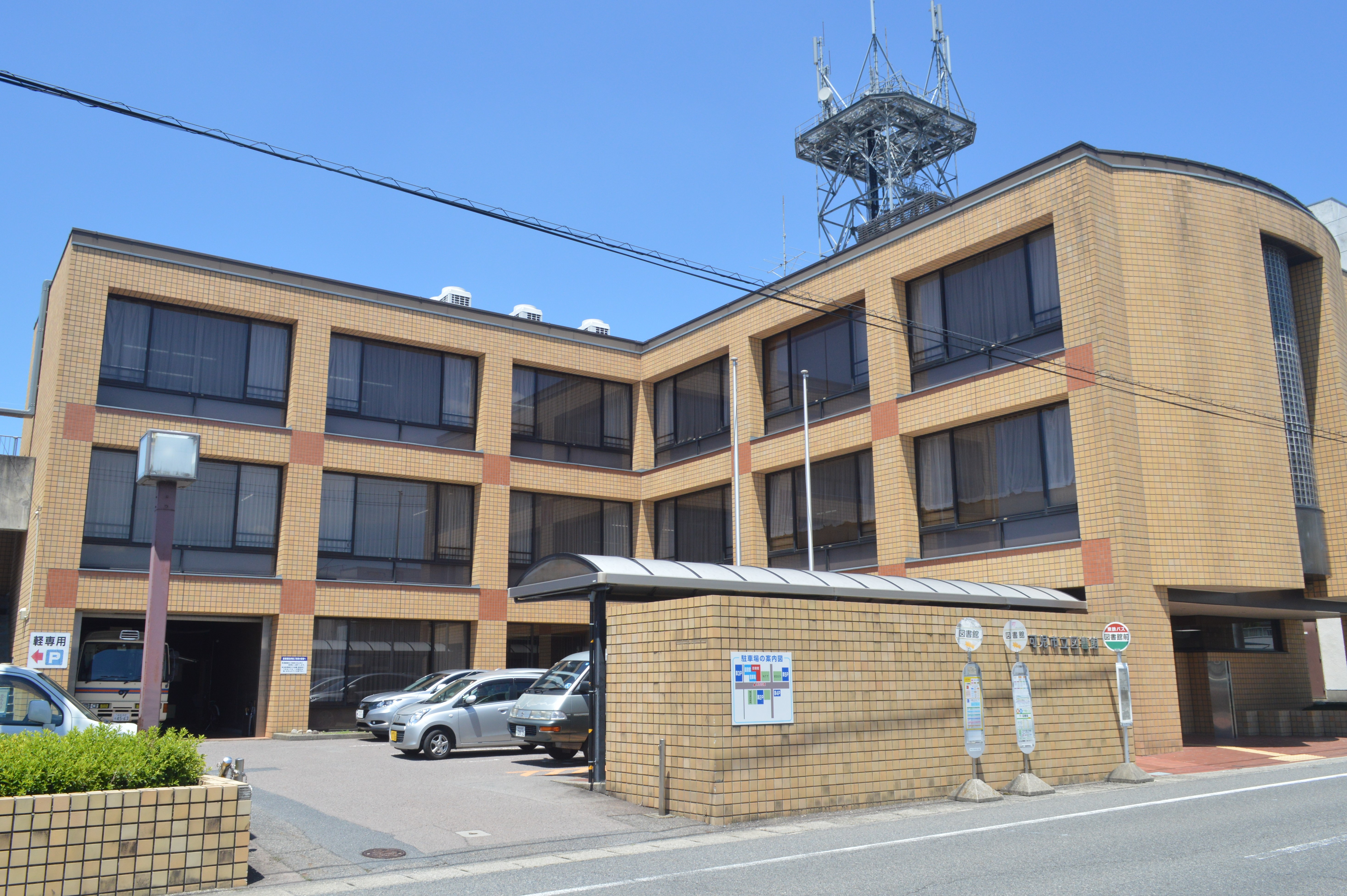 岐阜県可児市にある可児市立図書館。